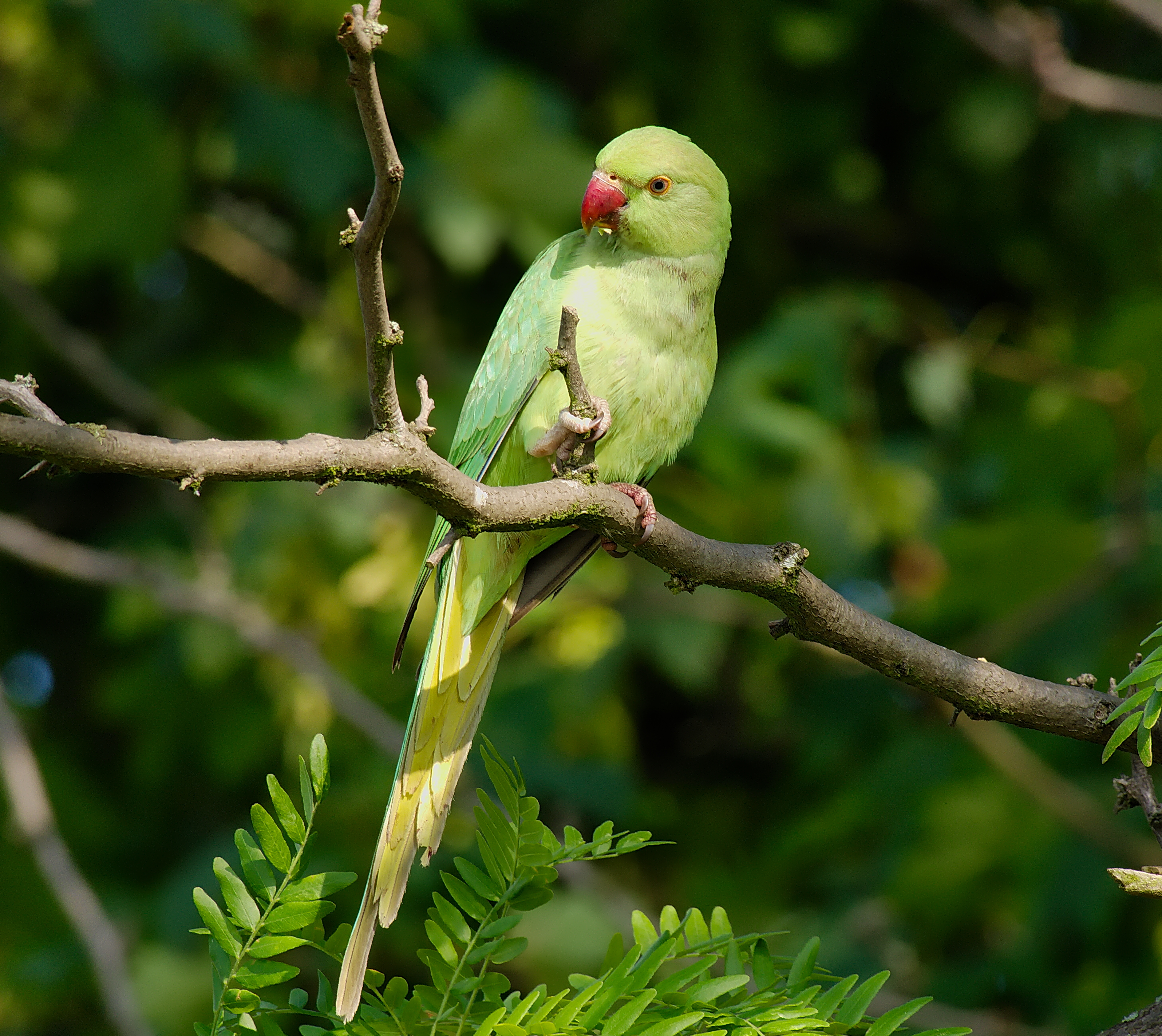 Halsbandsittich - Psittacula krameri, Weibchen. Aufgenommen in Mannheim am Vogelstangsee, Baden-Württemberg, Deutschland.